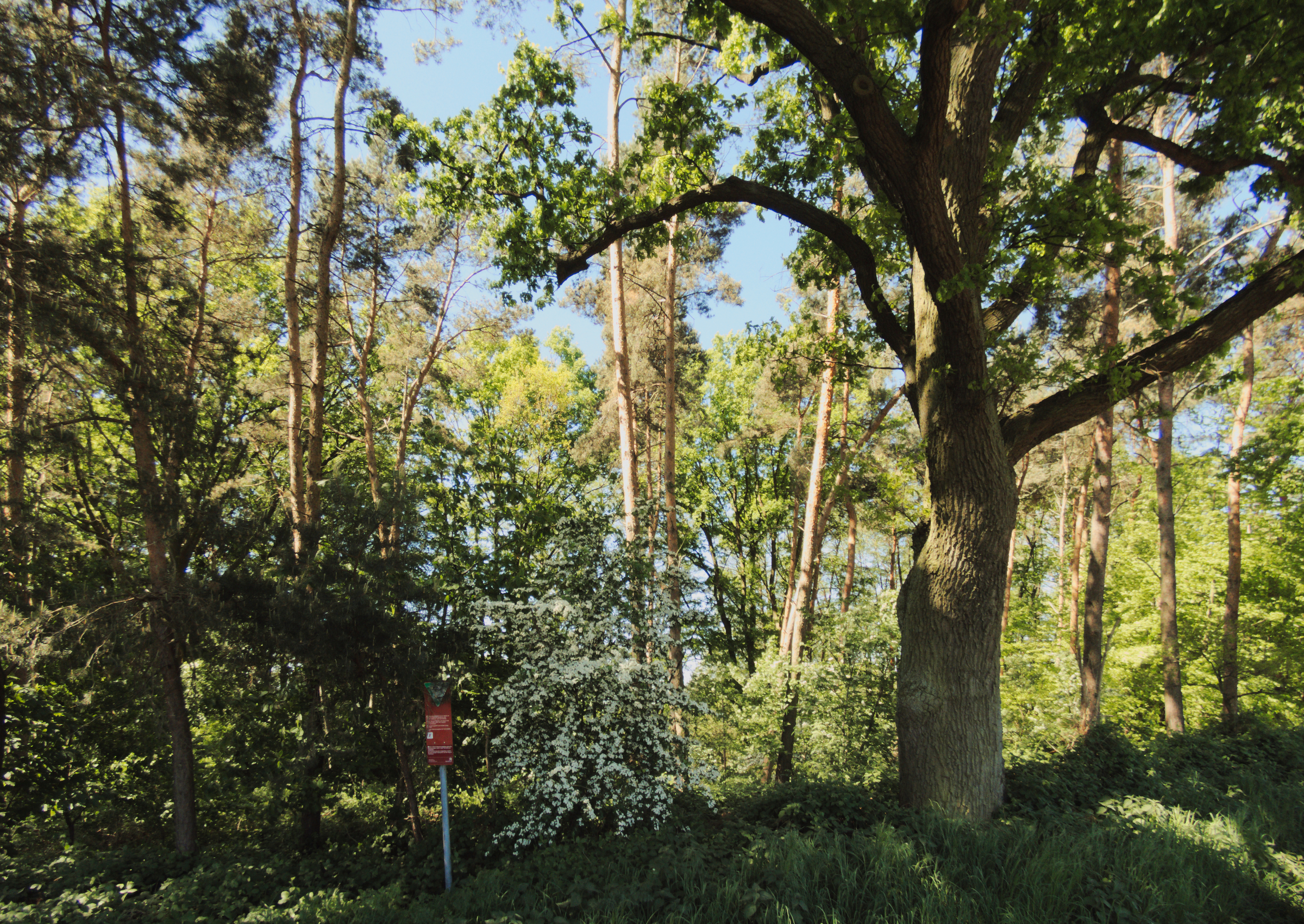 Das Naturschutzgebiet Wadebruch liegt bei Schloß Ricklingen im Niederungsbereich der Leine. Es stellt einen verlandenen Altarm und die Terrassenhänge des ehemaligen Prallhangs unter Schutz.